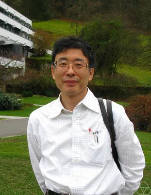 Foto di Toshiyuki Kobayashi